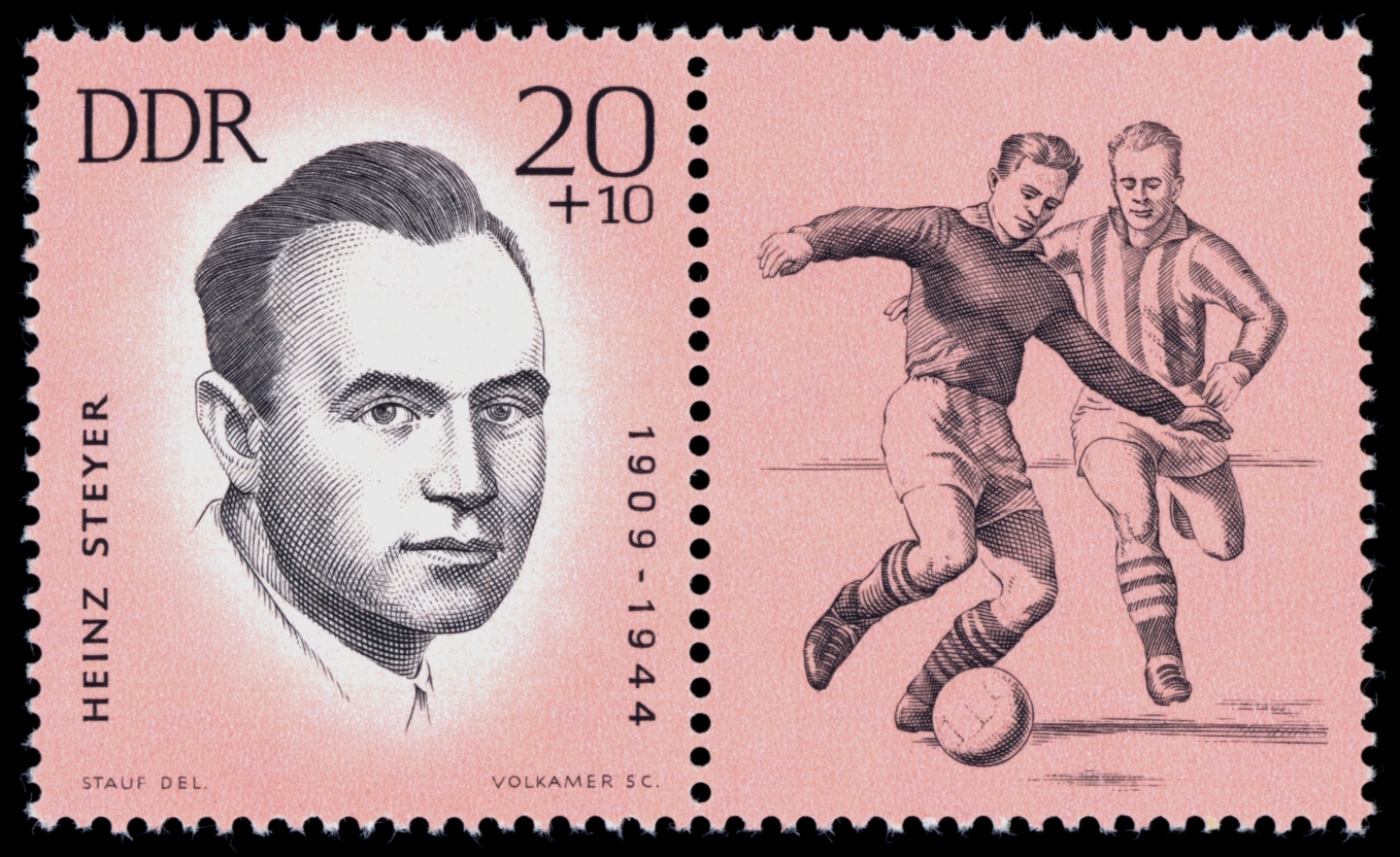 Information: Ausgabepreis: Pfennig First Day of Issue / Erstausgabetag: Auflage: Entwurf: Druckverfahren: Michel-Katalog-Nr: Ländercode-MiNr